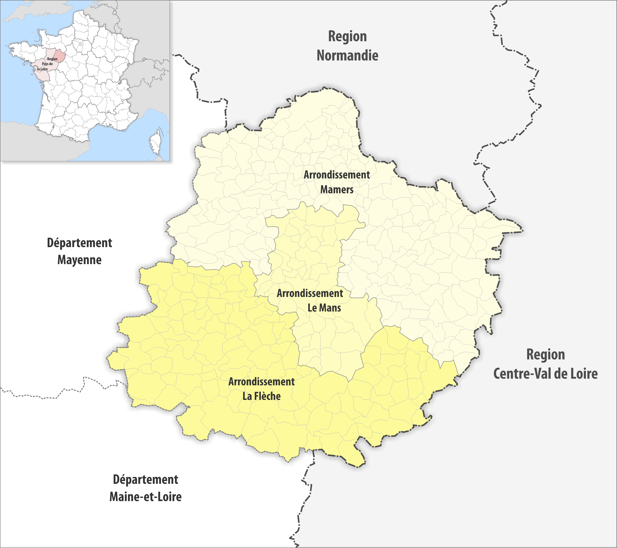 Gemeinden und Arrondissemente im Departement Sarthe